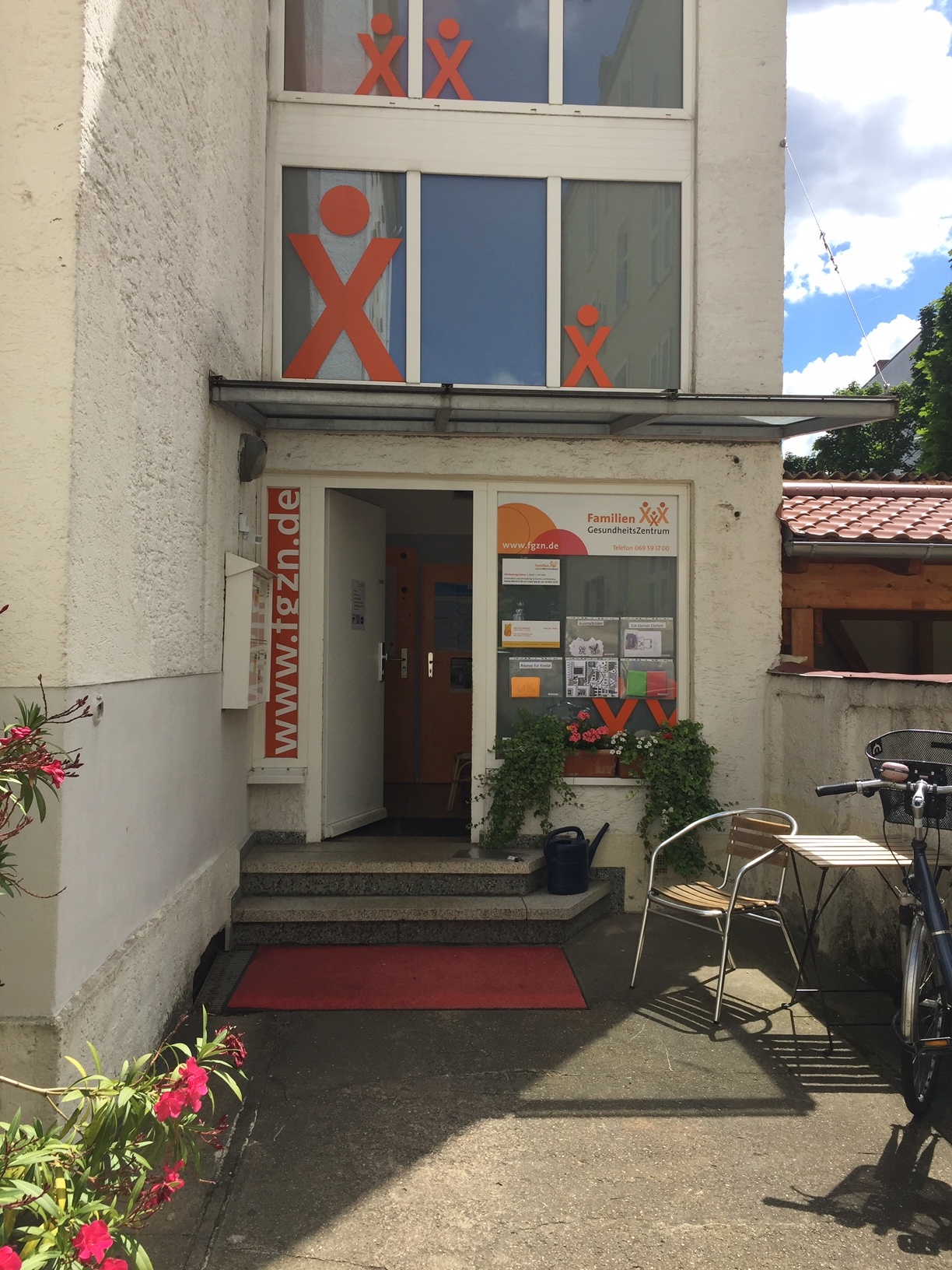 Eingang zum FamilienGesundheitsZentrum FGzN im Hinterhaus der Günthersburgallee_14H, seit den 90er Jahren.